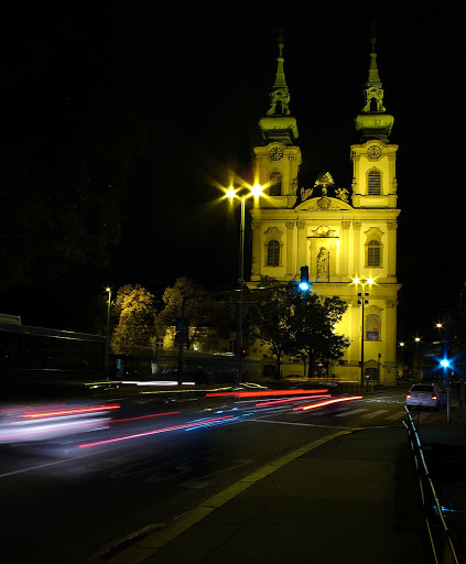 Budai Szent Anna templom